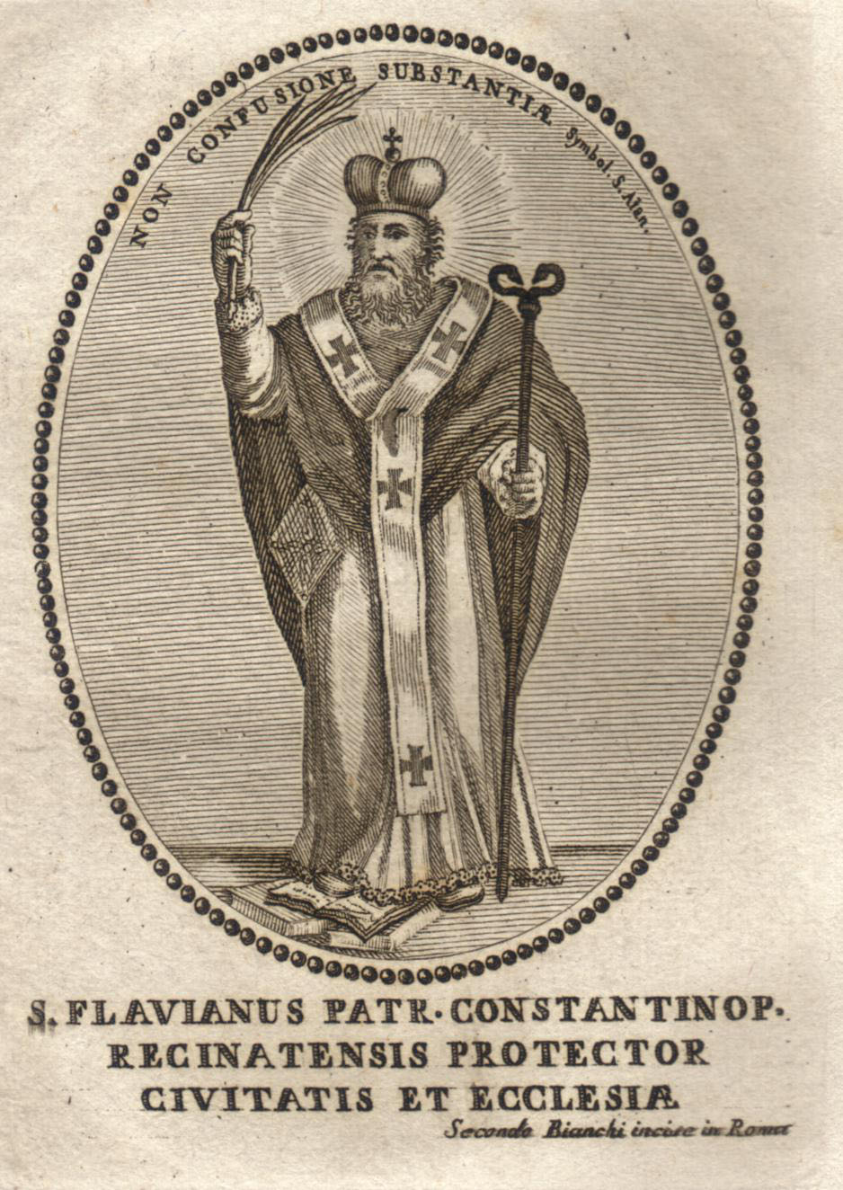 Antica incisione raffigurante San Flaviano in abiti patriarcali bizantini. Il motto espilica la sua difesa della duplice natura umana e divina insita in Cristo e che difese con la morte nel 449 durante il secondo concilio di Efeso. Sotto è indicato quale protettore della città e della diocesi di Recanati.